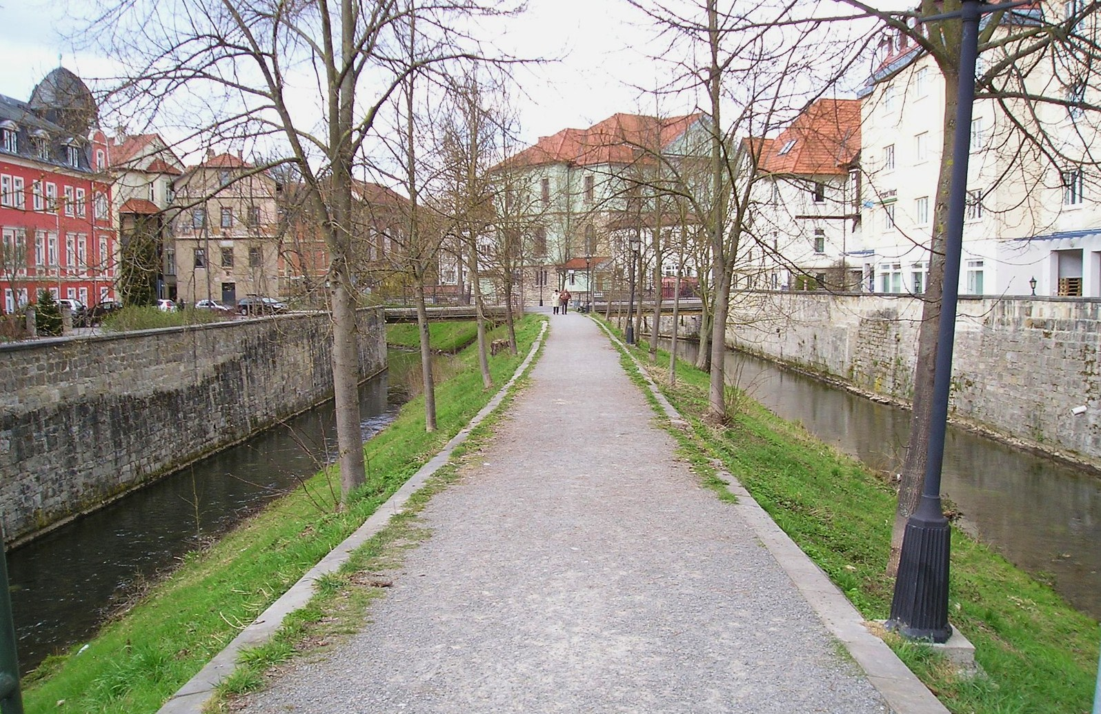 Bleichgräben mit dazwischenliegendem Wall als Teil der ehemaligen Stadtbefestigung von Meiningen, Wall heute als Promenadenweg mit Allee gestaltet.